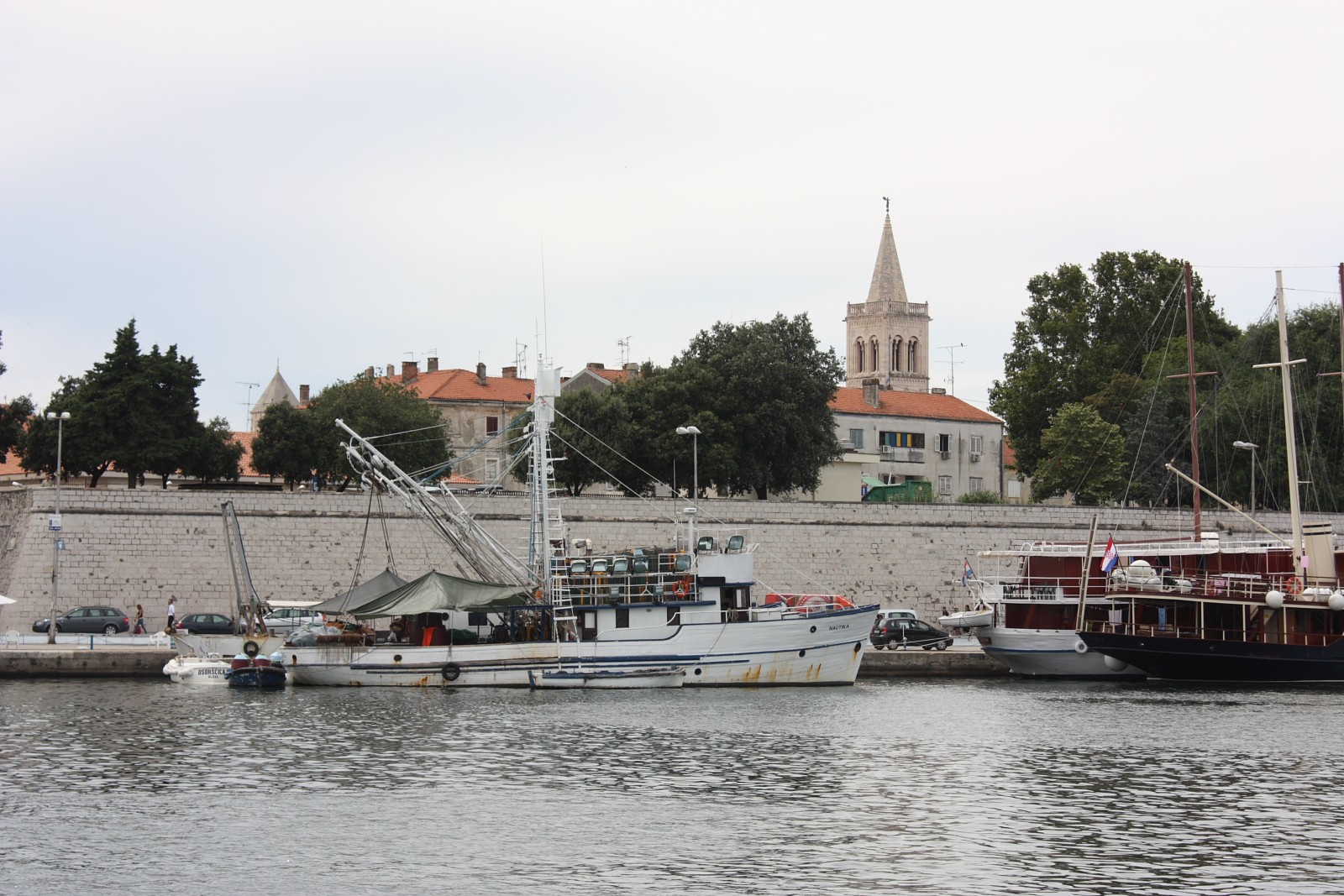 Zadar